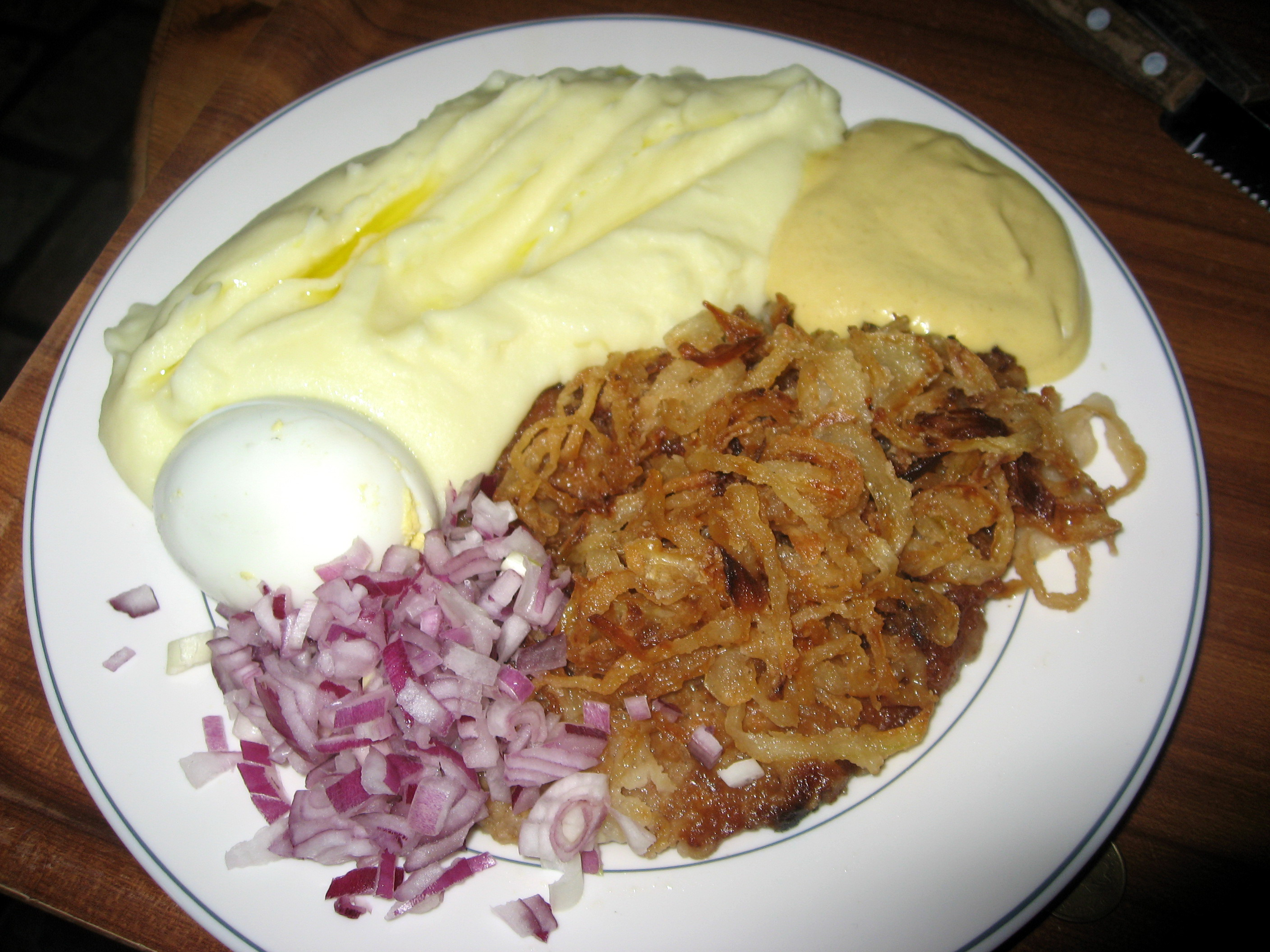 Vepřové maso s cibulí, bramborová kaše, vajíčko na tvrdo, hořtice, červená cibule